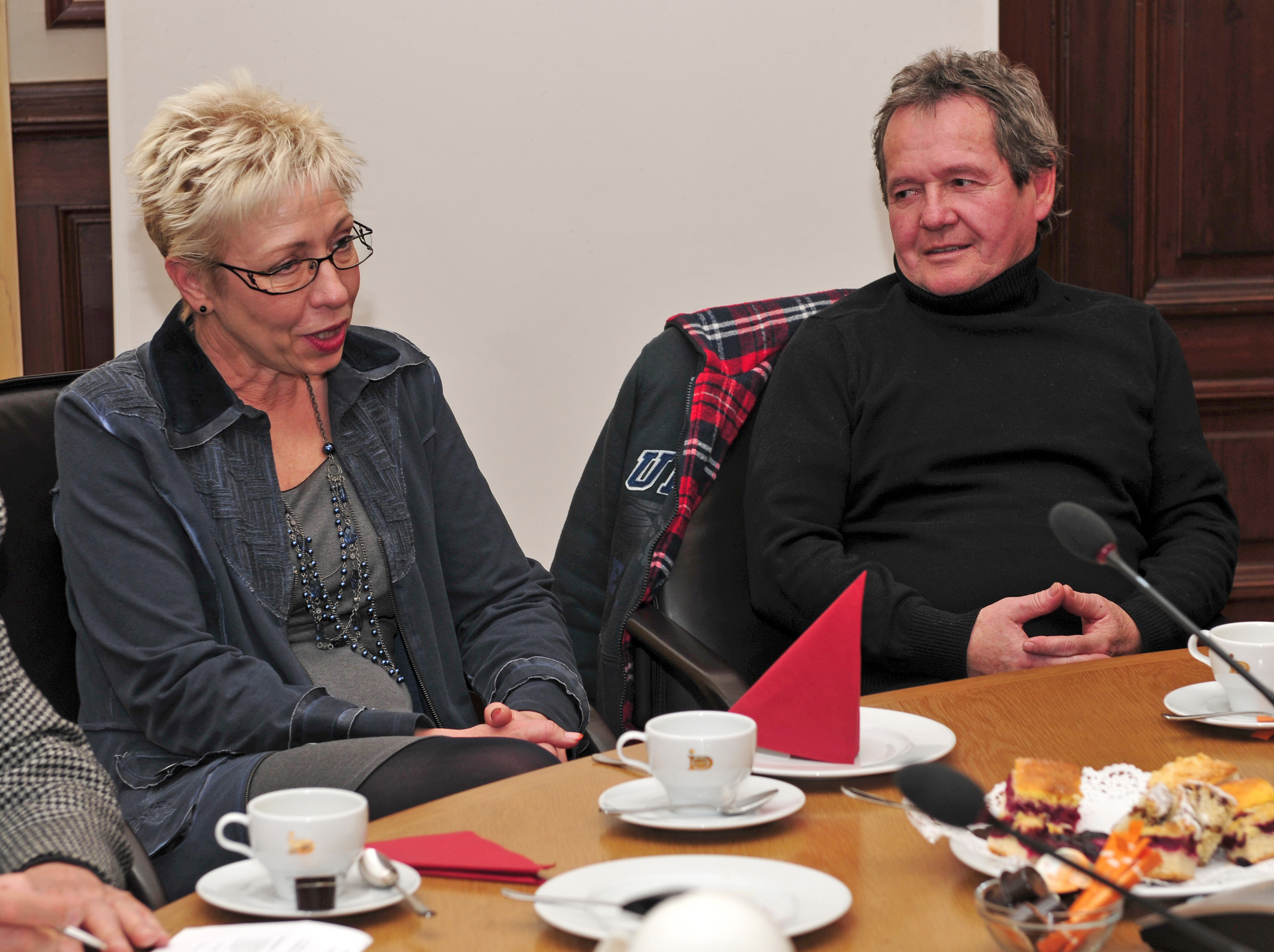 Weihnachtsfeier im Schloß Schwerin: Treffen der ehemaligen MdL, Sylvia Bretschneider und cz:Zdeněk Měšťan Videoprojekt im Landtag MV 11.–12. Dezember 2013 in Schwerin Fragen zur Nachnutzung Wenn Sie Fragen zur Nachnutzung dieses Videos haben, können Sie sich jederzeit gern an wenden Personality rights warningAlthough this work is freely licensed or in the public domain, the person(s) shown may have rights that legally restrict certain re-uses unless those depicted consent to such uses. In these cases, a model release or other evidence of consent could protect you from infringement claims.